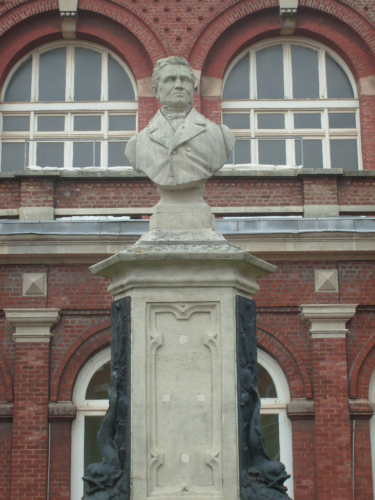 Buste de Gaspard Malo, devant la mairie de Malo-les-Bains